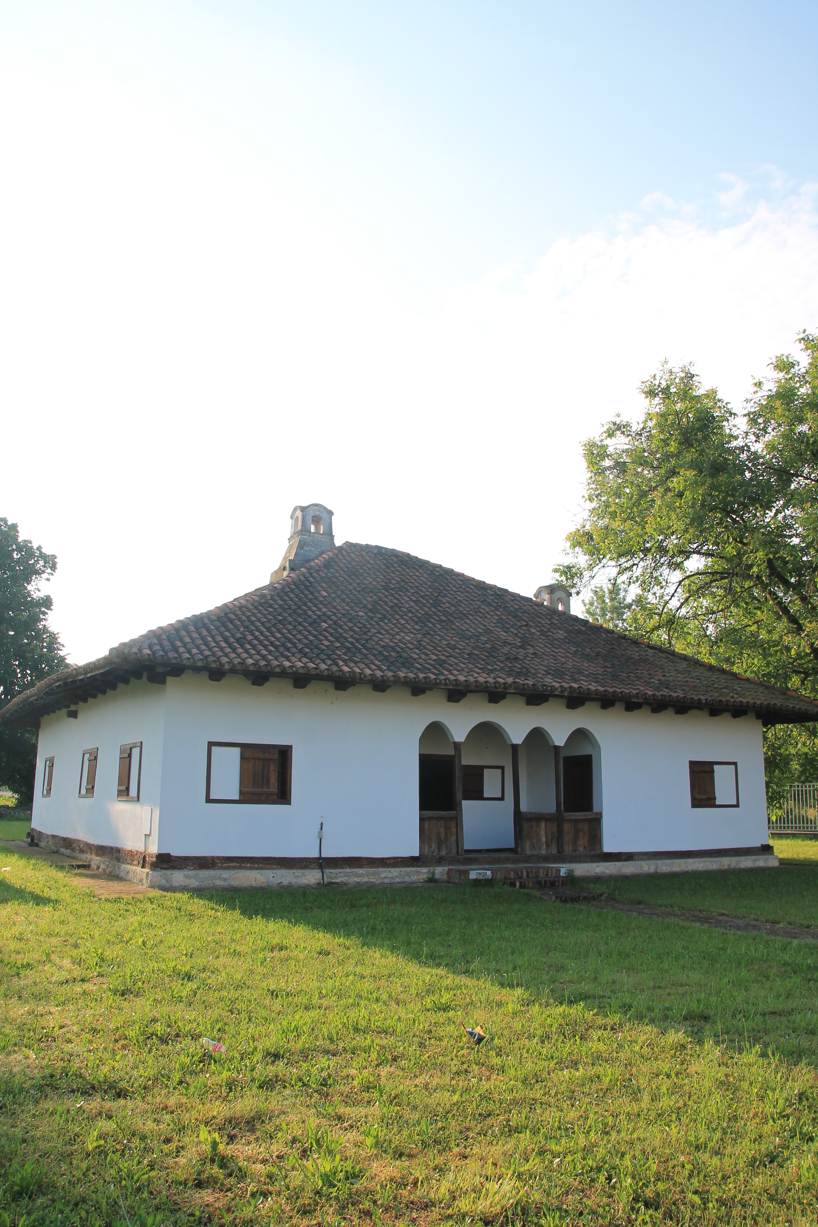 Stara zadružna kuća Rankovića